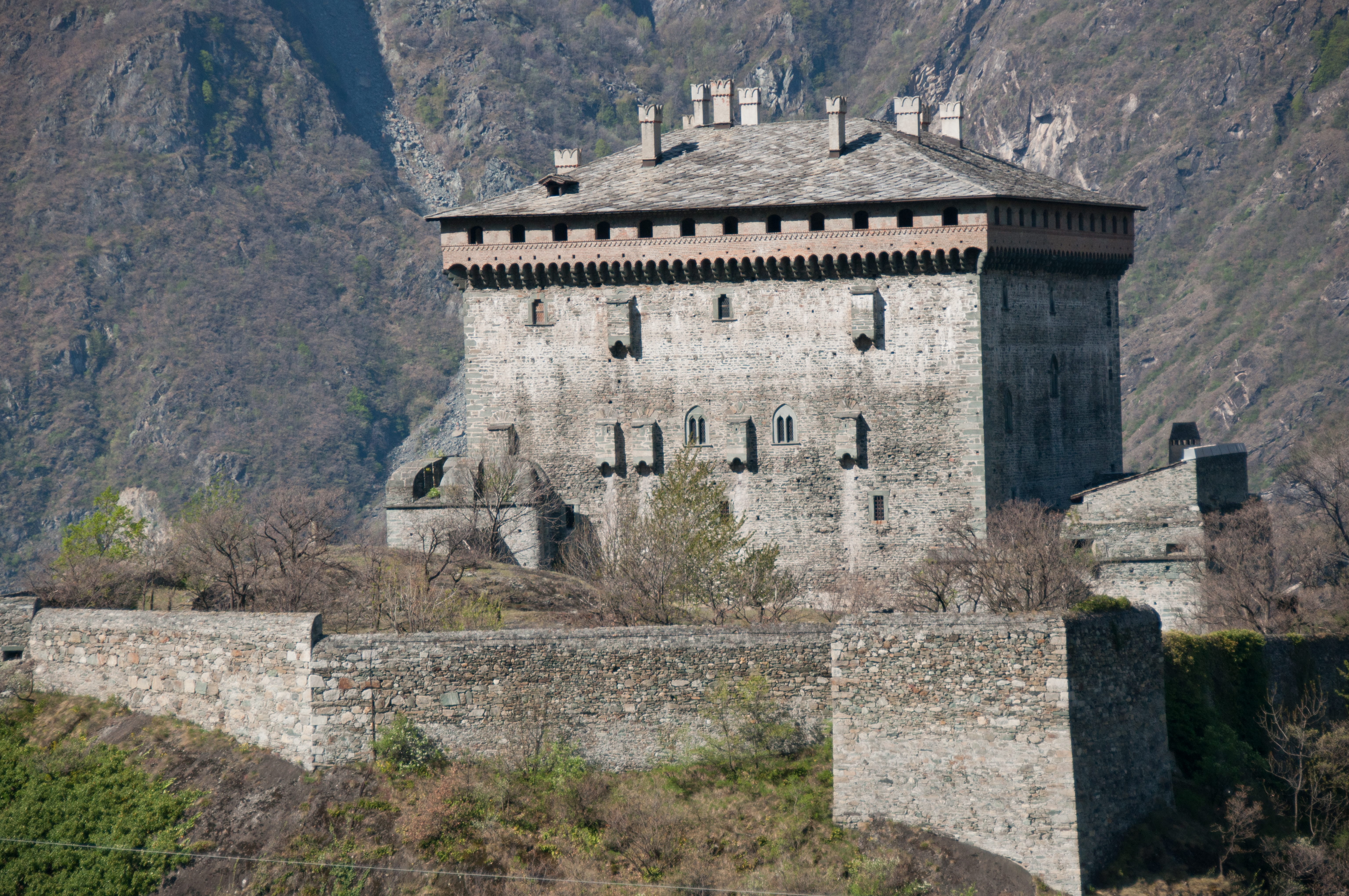 Straordinario esempio di castello monoblocco, fu costruito nell'ultimo decennio del XIV secolo da Ibleto di Challant, esponente di una delle principali famiglie nobili valdostane. This is a photo of a monument which is part of cultural heritage of Italy.